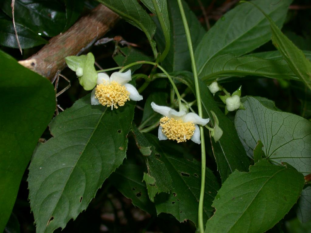 Platycorater arguta：バイカアマチャ 2007/08/05 和歌山県新宮市：Singu City, Wakayama pref. Japan